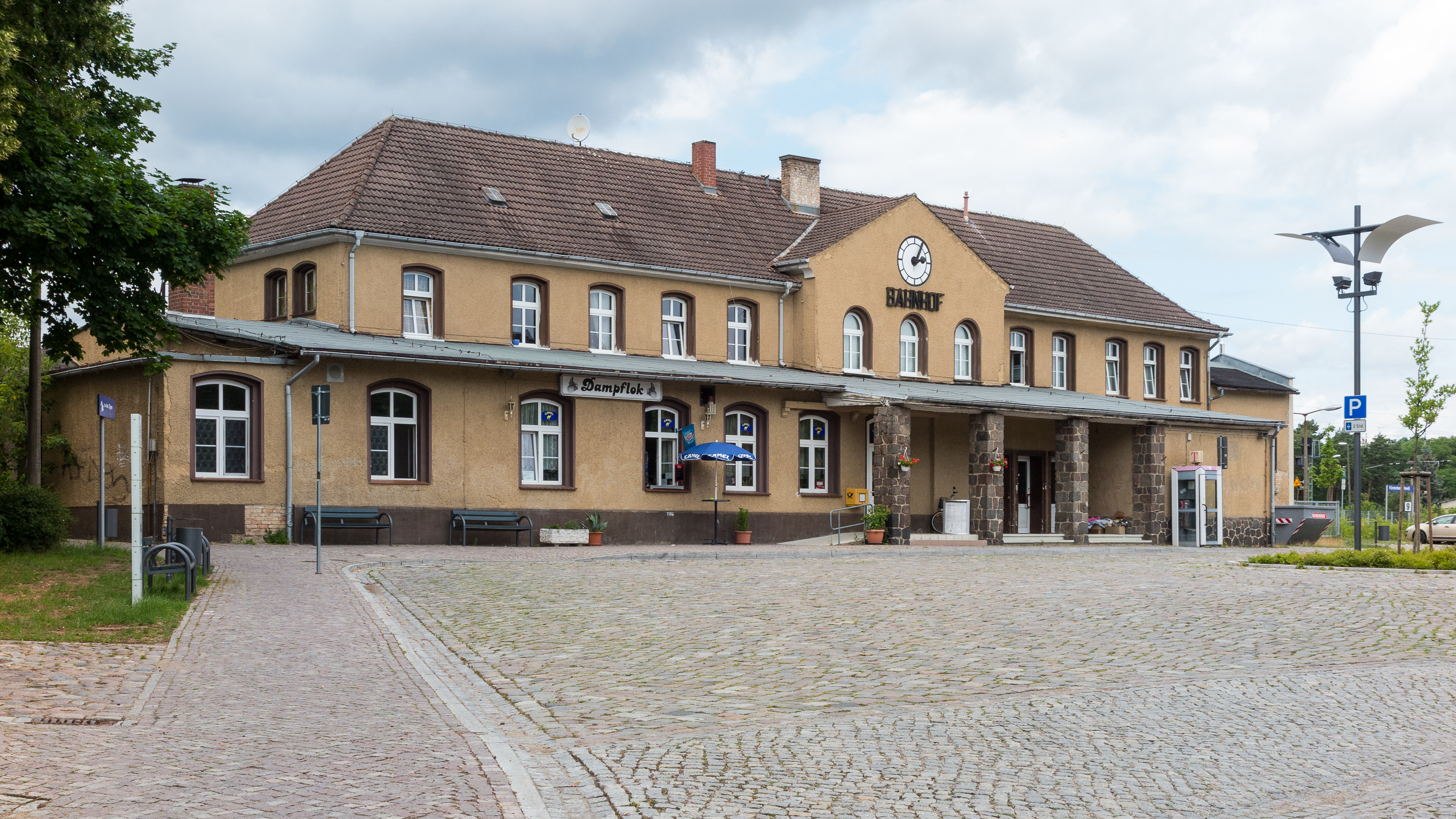 Bahnhof Fürstenberg (Havel)